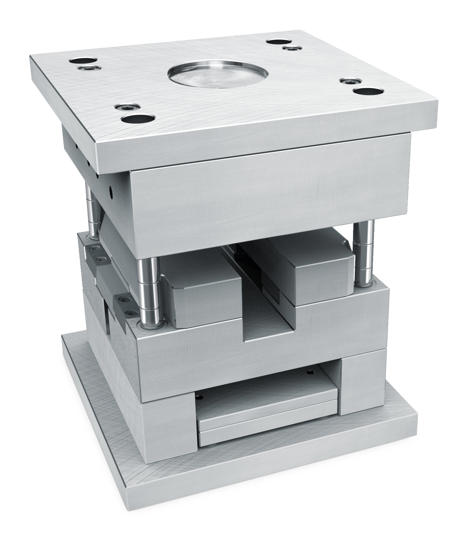 Funktionsfertige Backenformaufbauten aus präzisen Normteilen.